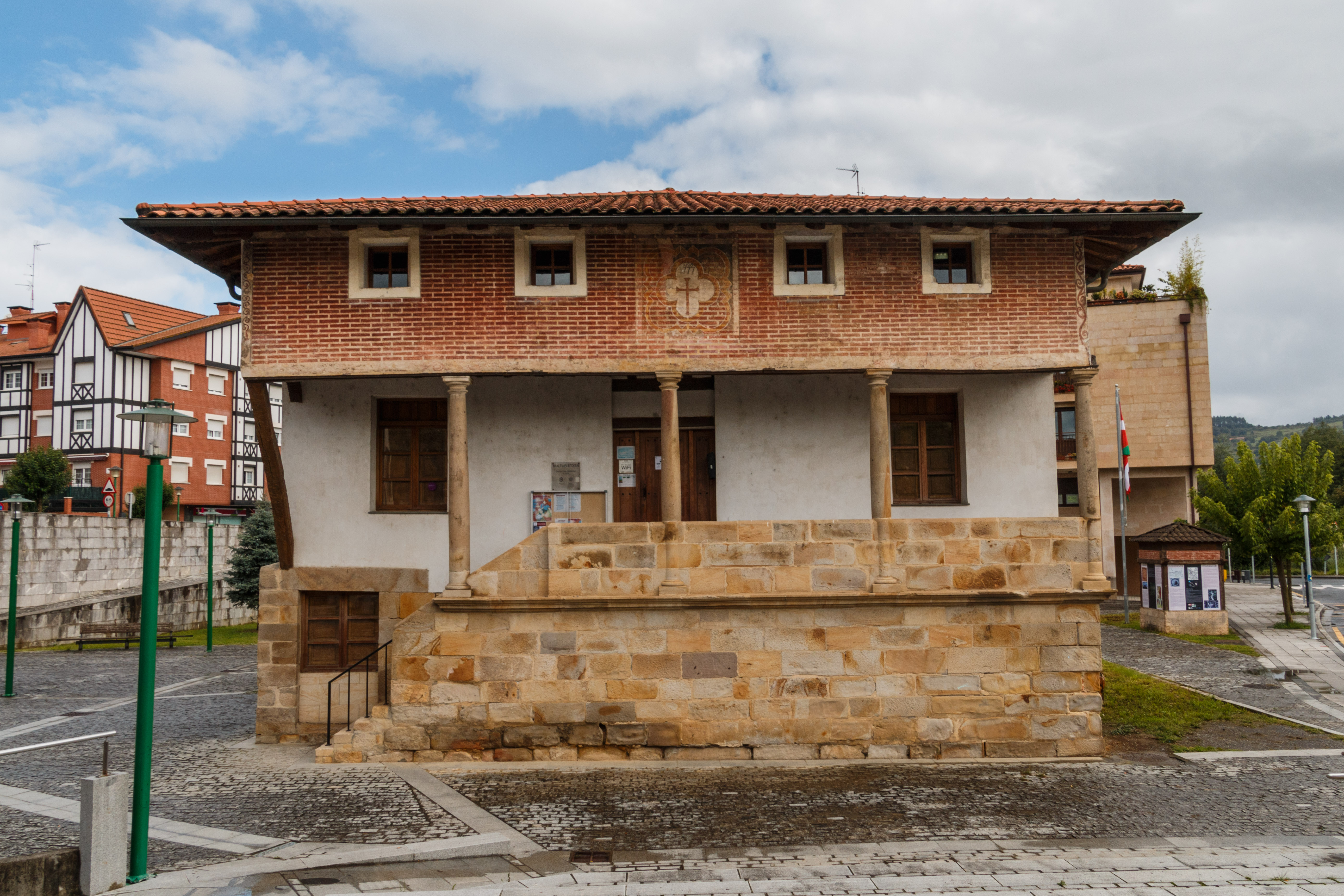 Anguleria jauregia